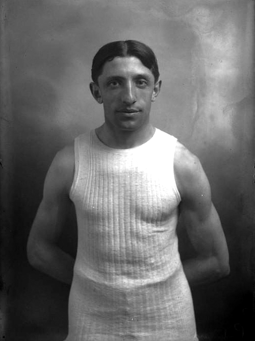 Poulenard [portrait]